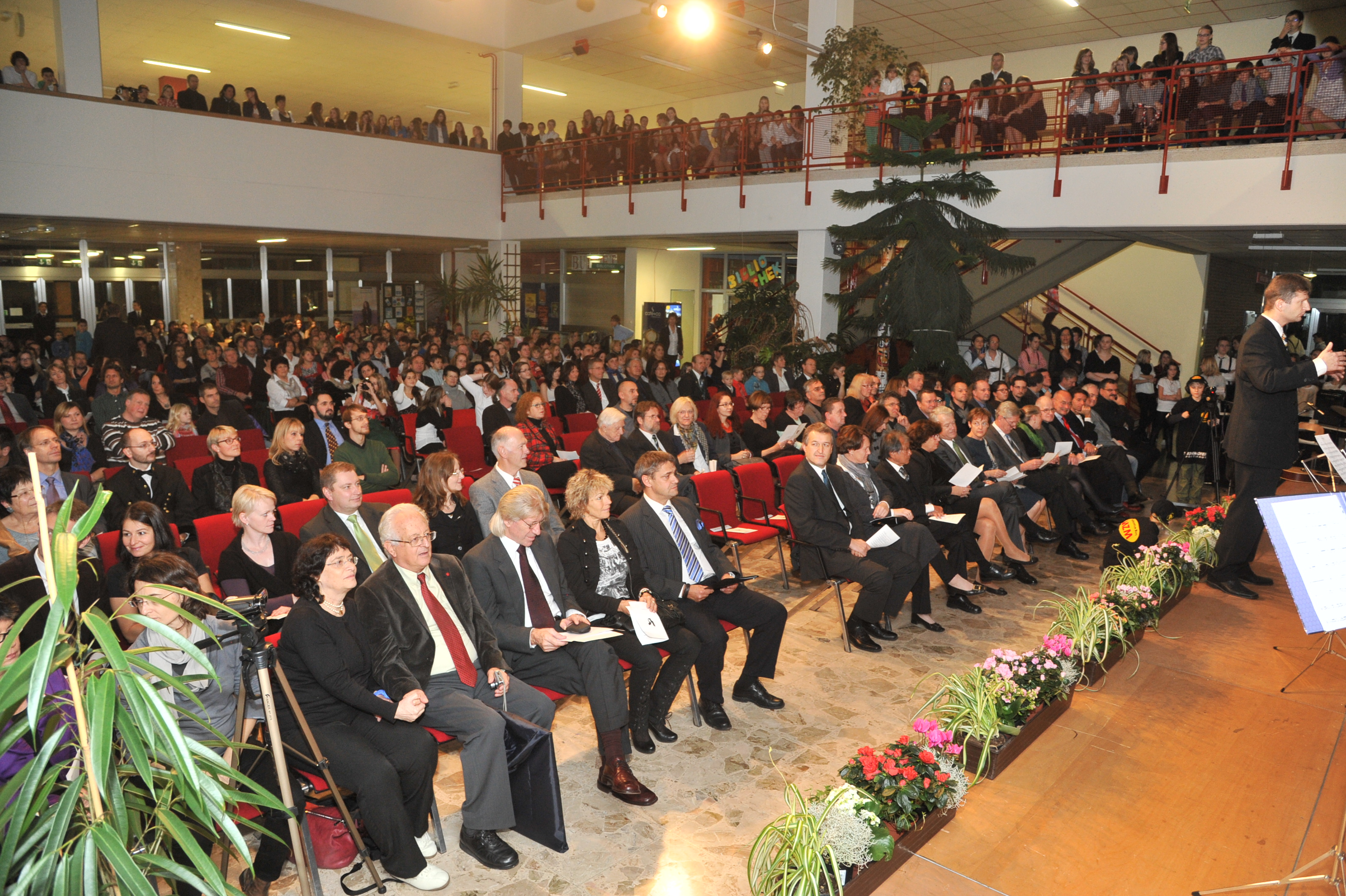 טקס קריאת בית הספר על שם הרטה רייך - ביום 23 בנובמבר 2012 כיבדה העיירה מירצצושלאג את זכרה של הגב' הרטה רייך (אייזלר בנעוריה), שנולדה בעיירה וגורשה ממנה אחרי האנשלוס, וחיה בין השנים 2012-1944 בישראל, וקראה את בית הספר התיכון המקומי על שמה: Herta Reich Gymnasium